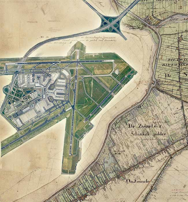 Ligging van Schiphol t.o.v. de vroegere Haarlemmermeer. Achtergrond voorloper TMK, ca 1840. Eigen compilatie. Vrij te gebruiken.